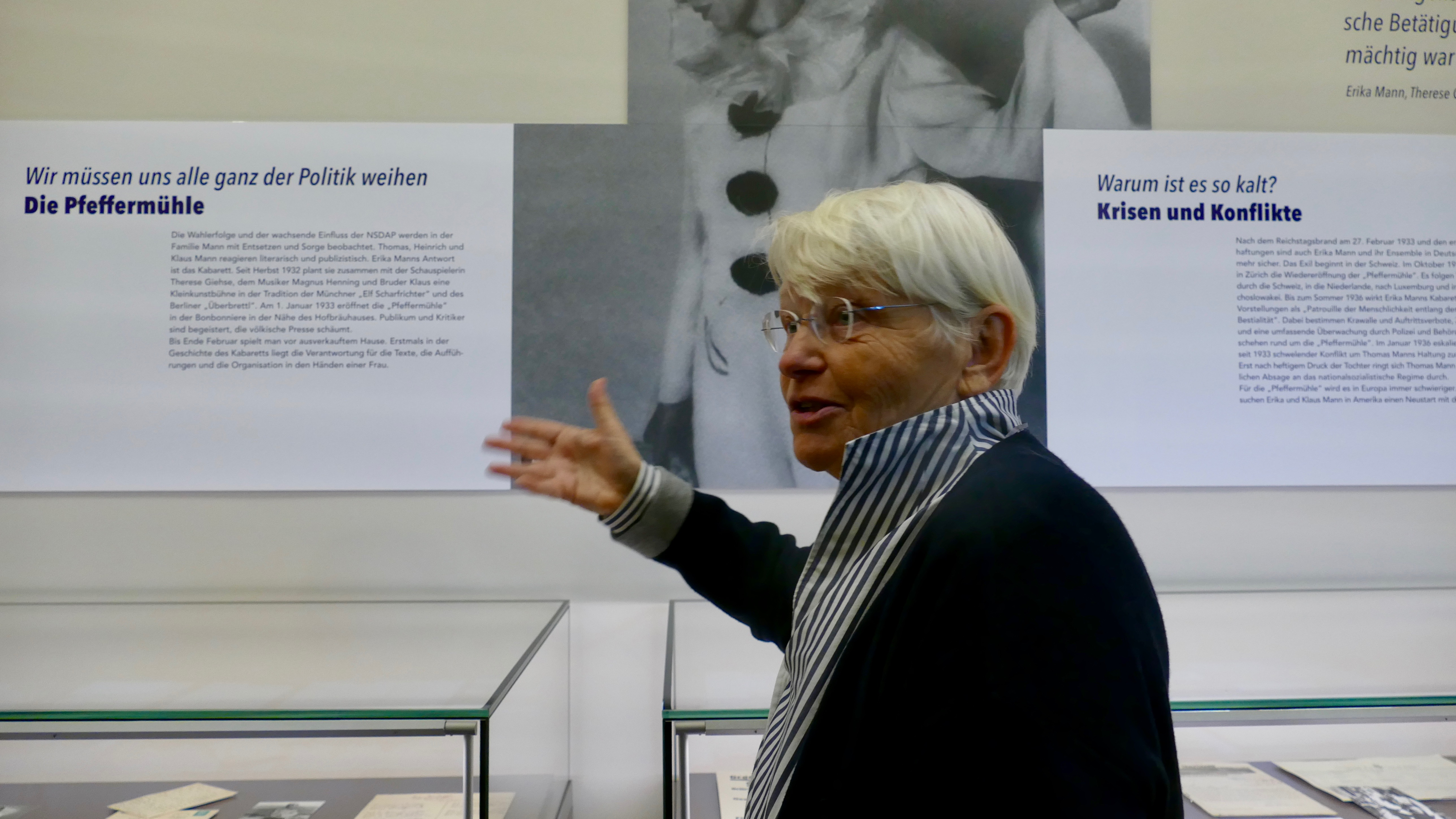 Die Geisteswissenschaftlerin Prof. Dr. Irmela von der Lühe in der von ihr kuratierten Ausstellung "Erika Mann. Kabarettistin - Kriegsreporterin - Politische Rednerin" in der Monacensia